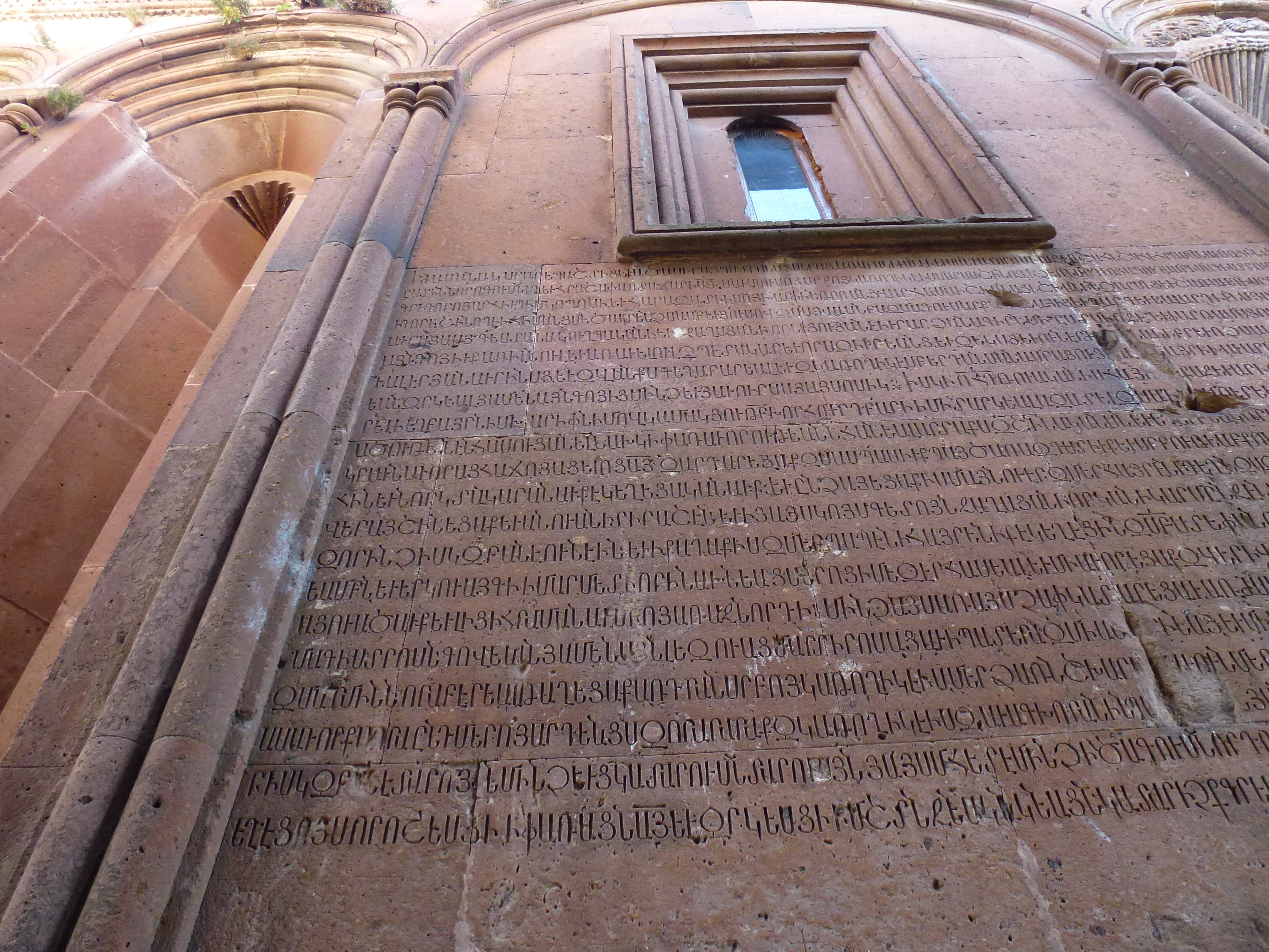 Մարմաշենի վանական համալիր 108/10